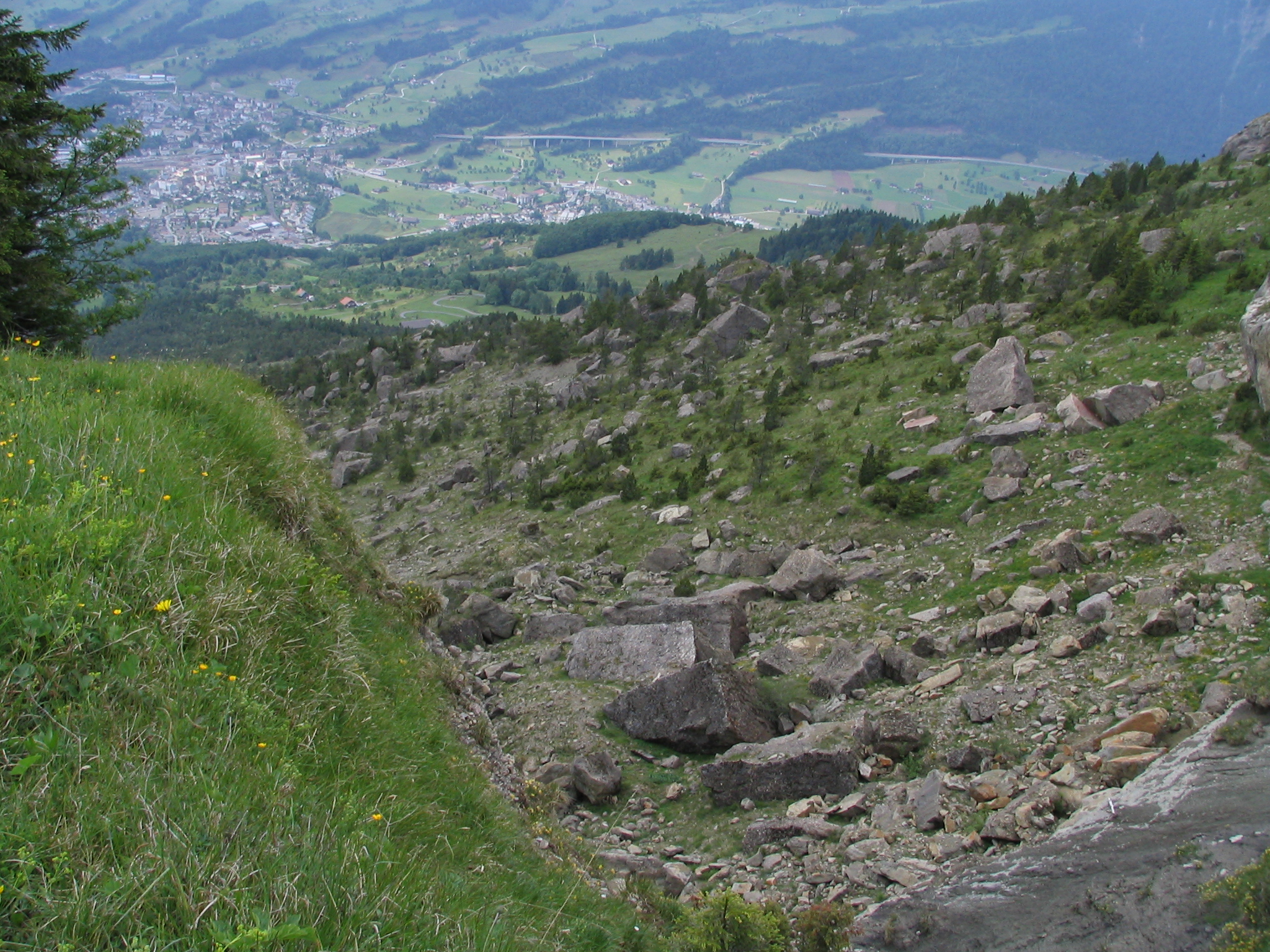 Bergsturz von Goldau: Blick vom Anrissgebiet (Gnipen/Rossberg) hinunter auf Goldau